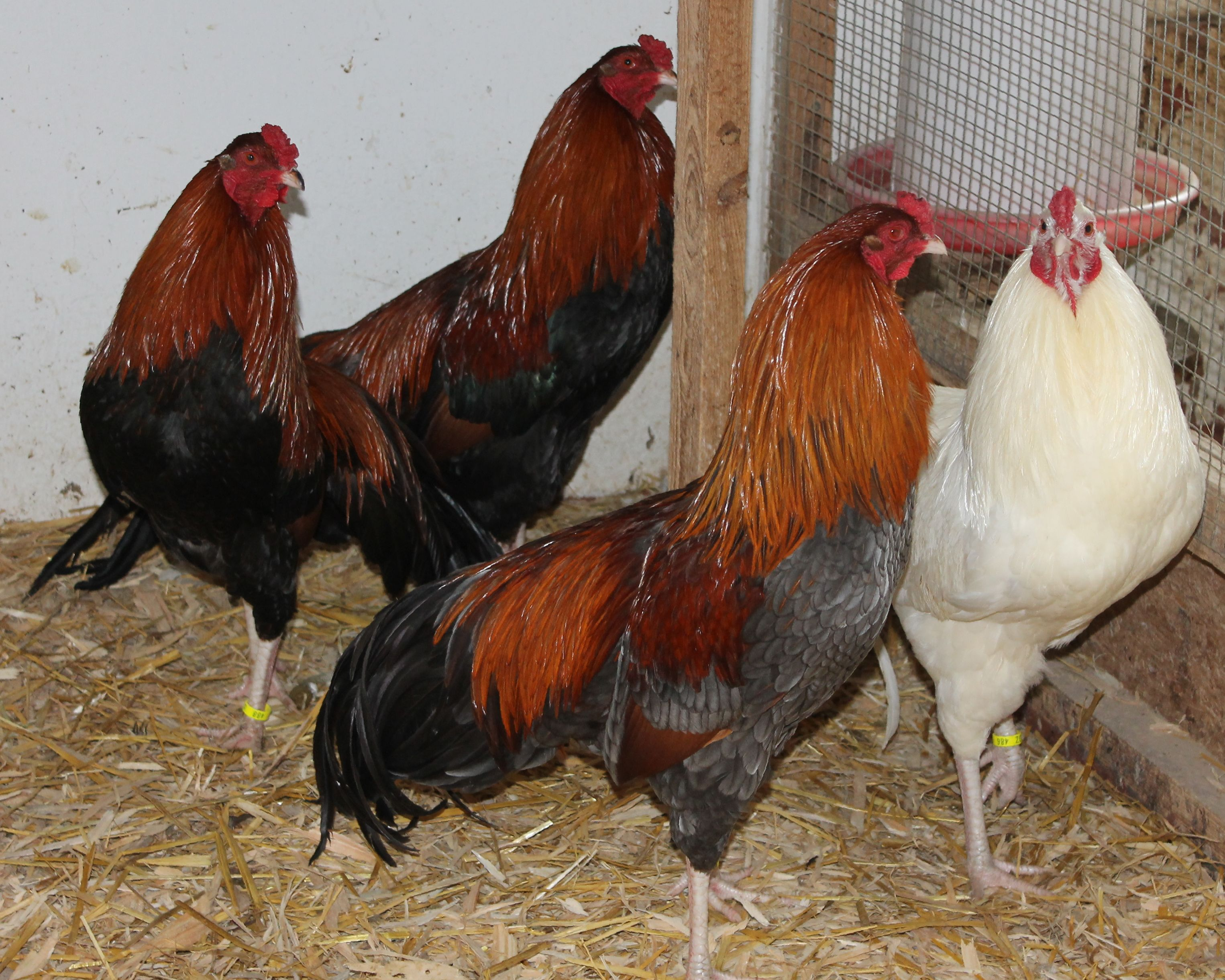 Cubalaya-Hähne wildfarbig-zimtfarbig, blau-zimtfarbig und weiß bei K. Wagner (v. links nach rechts), Foto: Kruppert